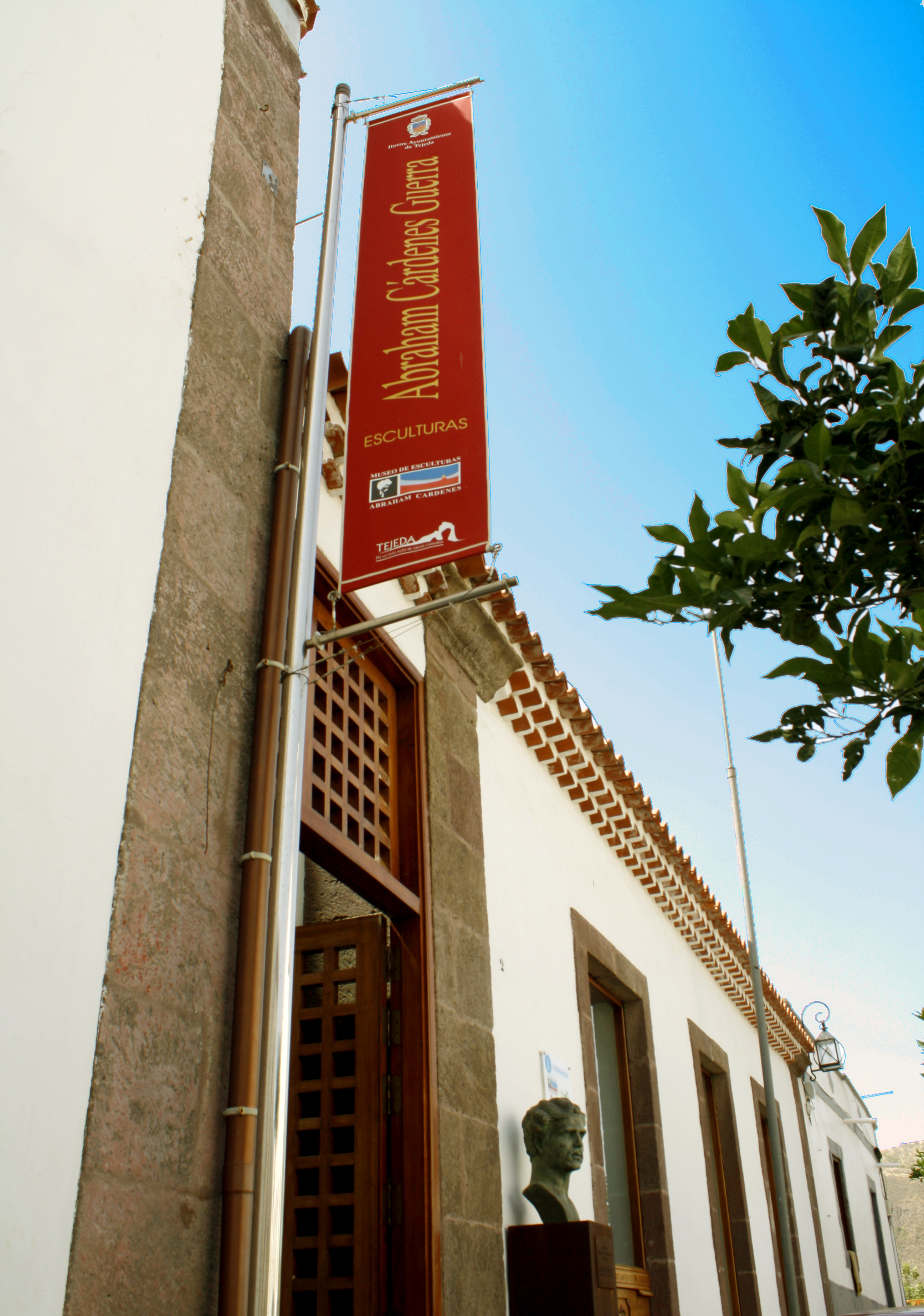 Museo Abraham Cárdenes, Tejeda, Gran Canaria, España (Spain)